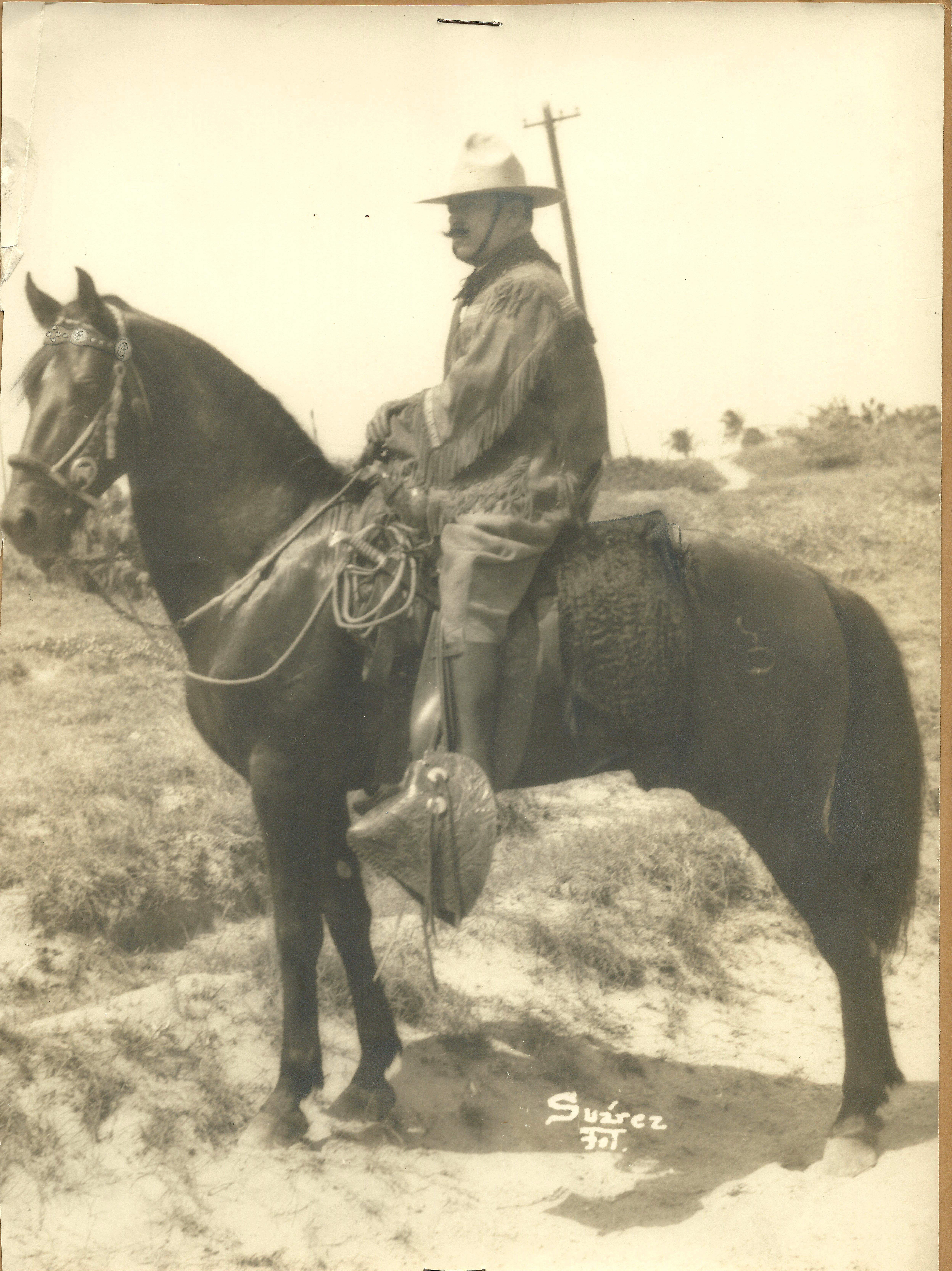 GENERAL ARNULFO R GOMEZ A CABALLO